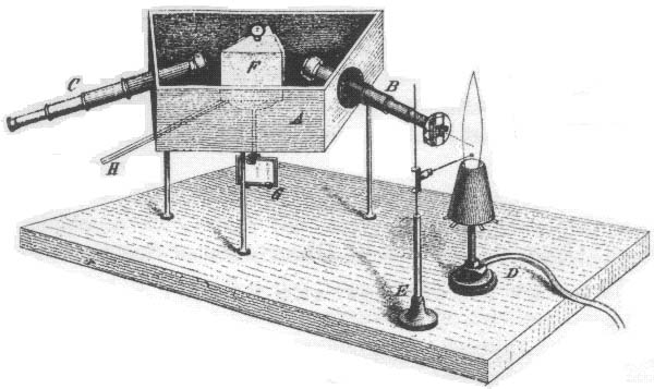 Kirchhoff-Bunsen Spectroscope (from Annalen der Physik und der Chemie (Poggendorff), Vol. 110 (1860))